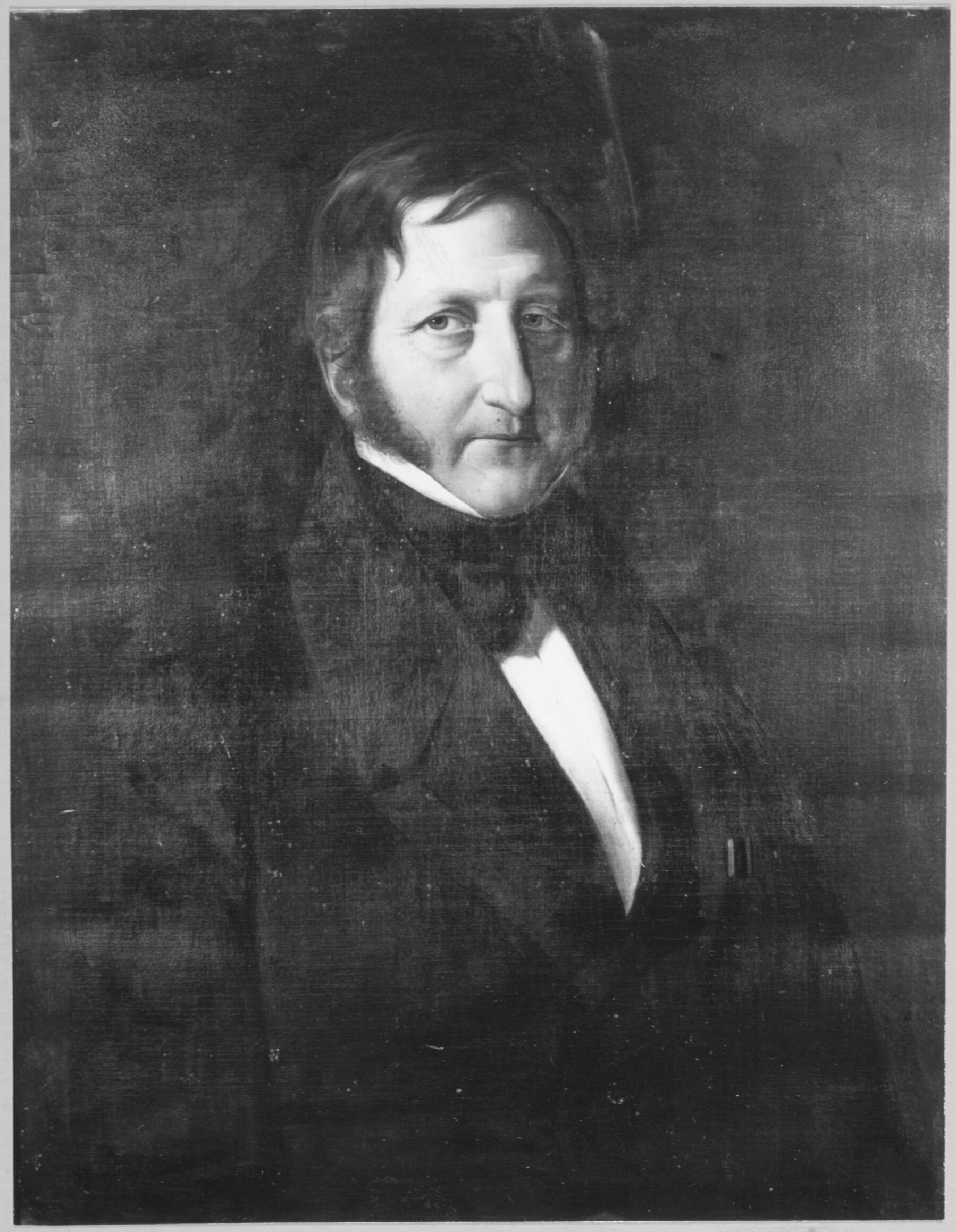 Jan Corver Hooft painted by Johann Heinrich Richter